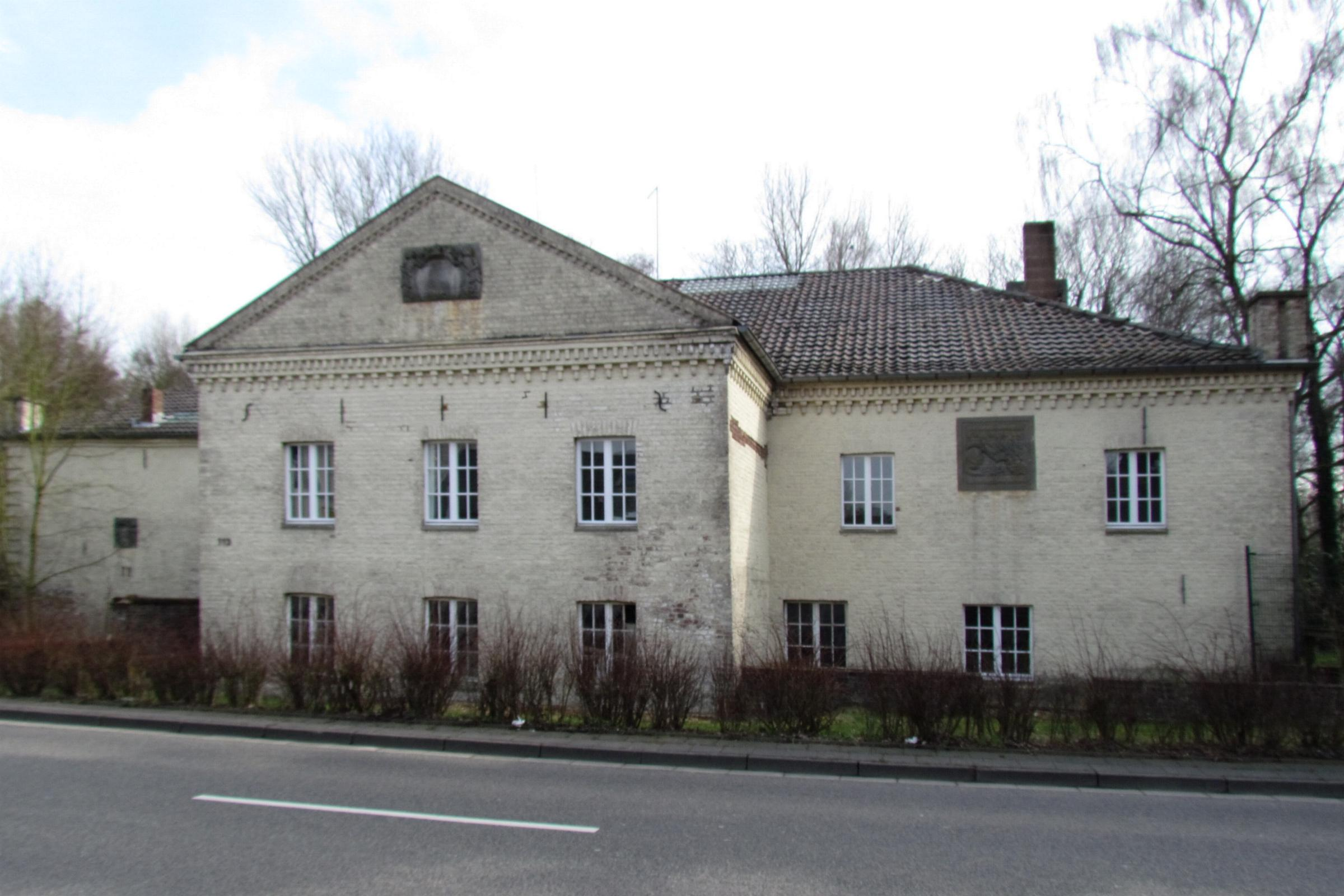 Wassermühle in der Stadt Mönchengladbach